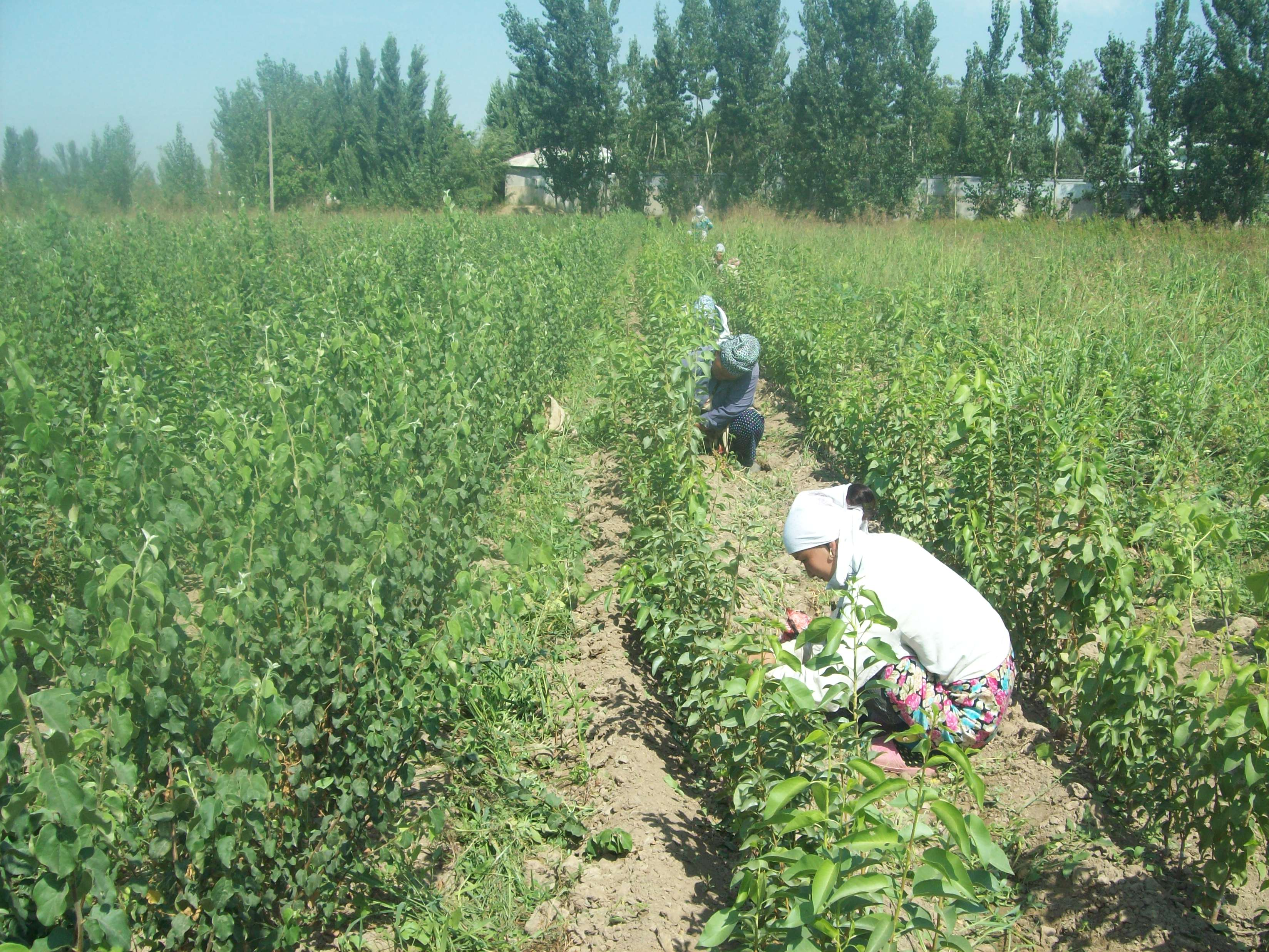 Процесс окулировки плодовых культур, женщина-окулировщик надрезает окулянт "Т"-образным путем и вставляет щиток культурного сорта.